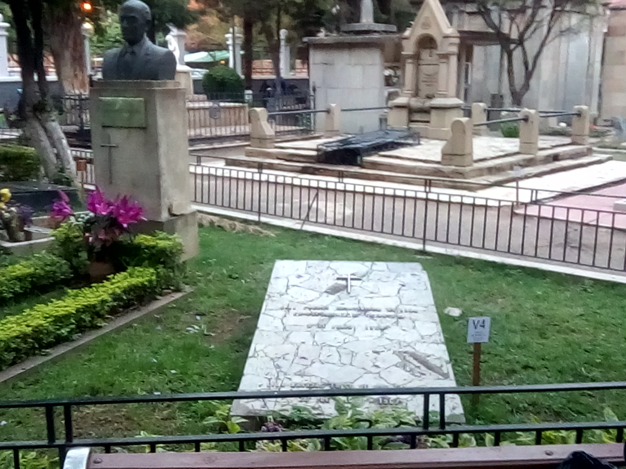 Tumba de Carlos Quintanilla Quiroga (Cementerio General - Cochabamba, Bolivia)